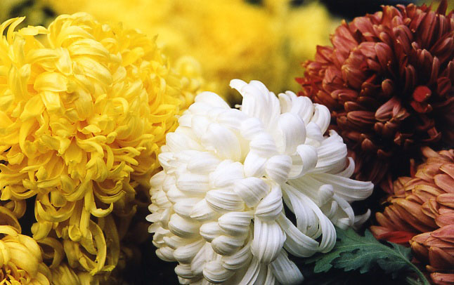 chryzantemy hodowlane